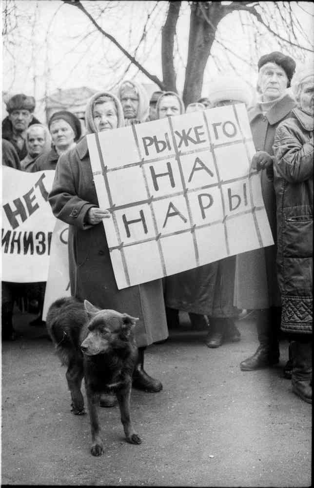 9 апреля 1998 года на Народной площади состоялся митинг трудящихся и безработных города Переславля в рамках Всероссийской акции профсоюзов «За полную выплату заработной платы». Принята резолюция, которая требовала решить социальные вопросы: дать стабильную работу и достойную заработную плату каждому россиянину, погасить долги по заработной плата до 1 июля 1998 года, а остальные задолженности до конца 1998 года, дать законодательную защиту прав и интересов трудящихся, добиться обязательной отставки президента Ельцина. Лозунг на плакате: «Рыжего на нары» (имеется в виду Анатолий Борисович Чубайс).